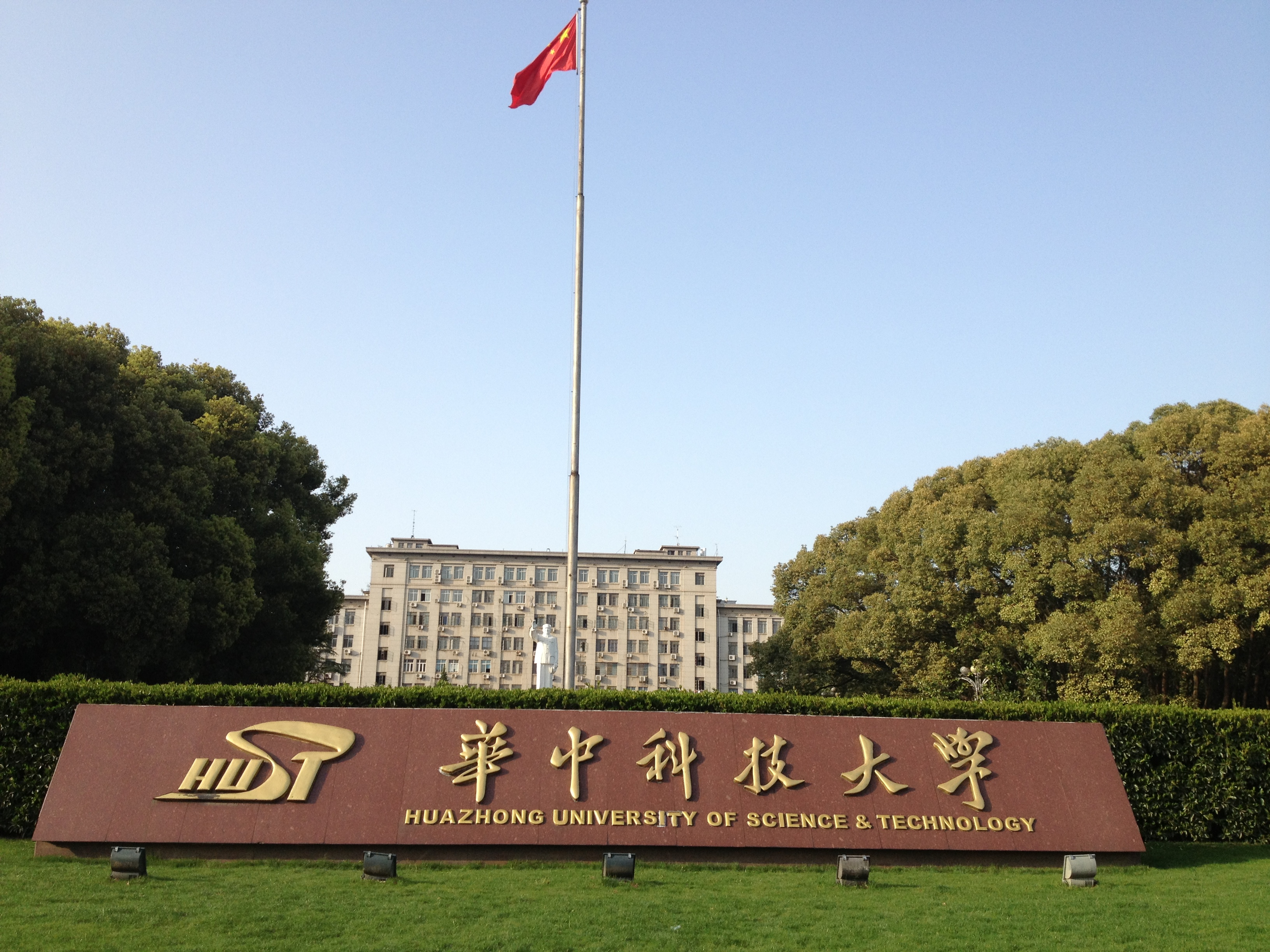 华科正大门